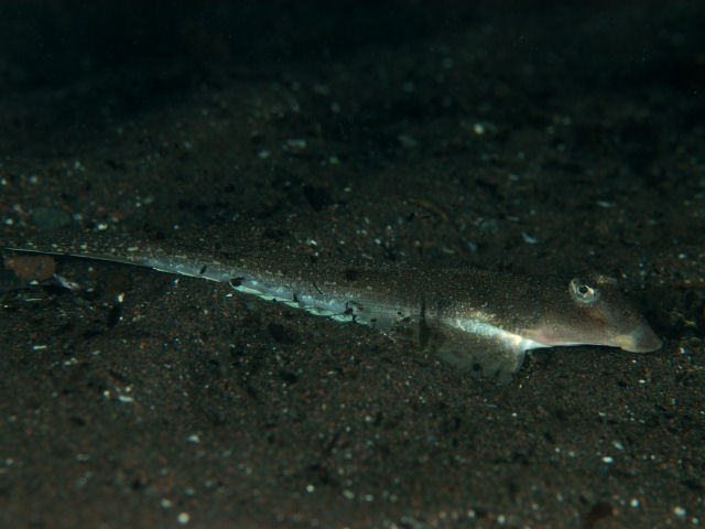 ネズミゴチ Repomucenus richardsonii